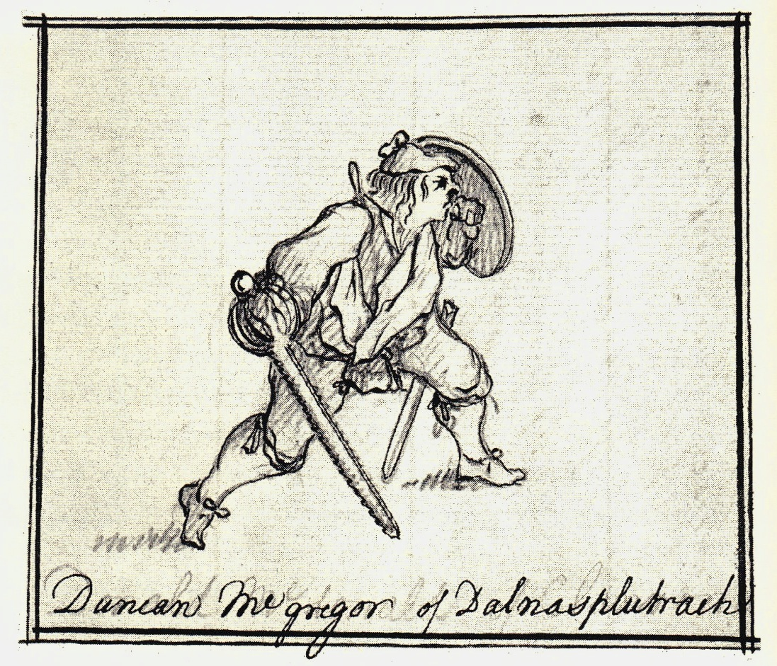 Набросок, сделанный неизвестным автором во время якобитского восстания 1745 года в Шотландии, в г. Пеникуик.